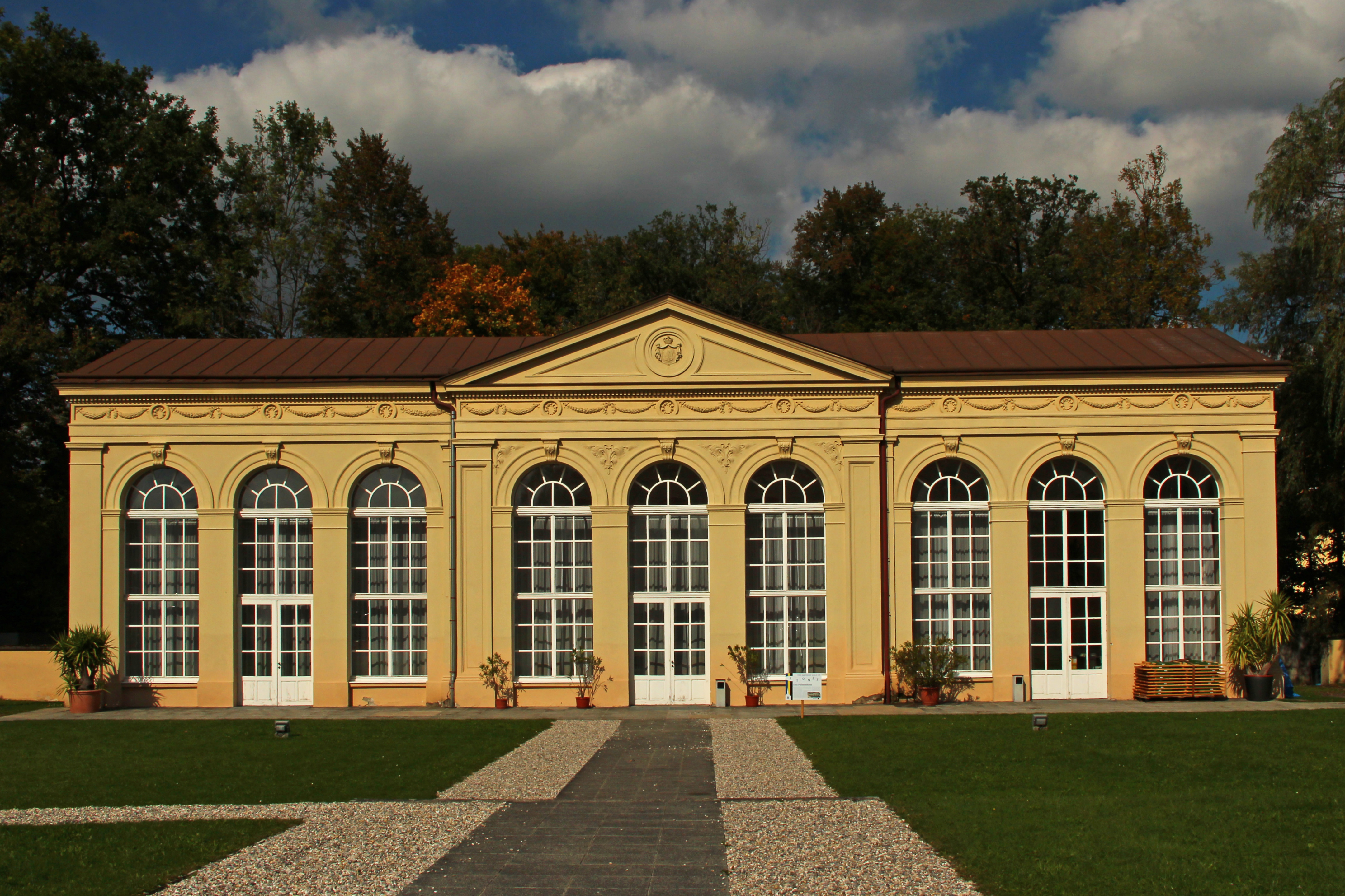 Das frühhistoristische Bauwerk stammt aus dem Jahr 1858. Dieses Bild wurde anlässlich des österreichischen Tags des Denkmals 2012 in Niederösterreich eingereicht.